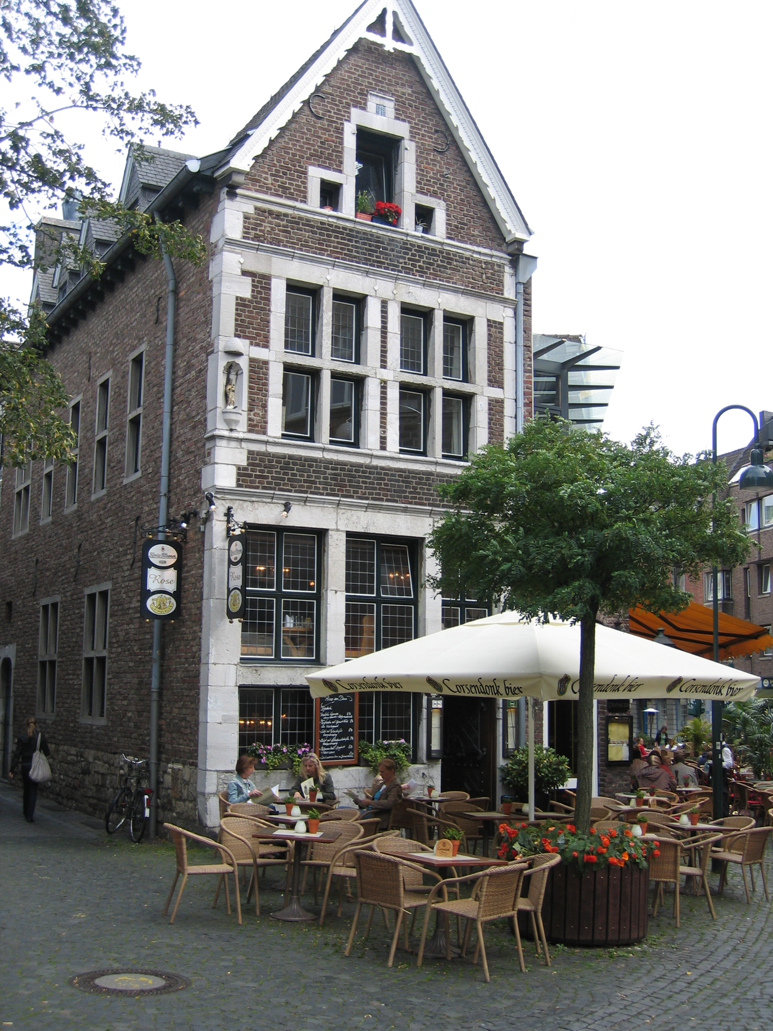 Haus Goldene Rose in Aachen